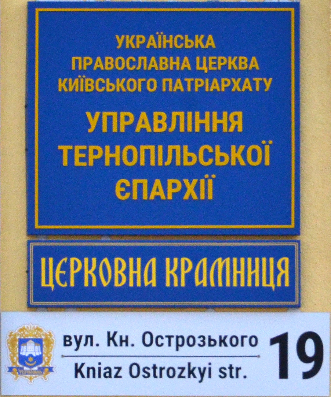 Управління Тернопільської єпархії УПЦ КП, вулиця Князя Острозького, 19, м. Тернопіль.